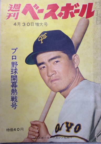 週刊ベースボール1958年4月30日号の表紙を飾る長嶋茂雄